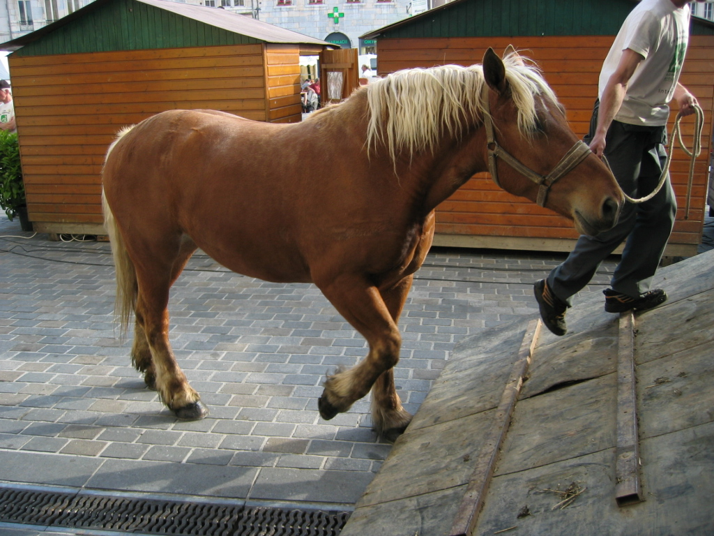 Cheval de race " comtois " - Franche-Comté - France